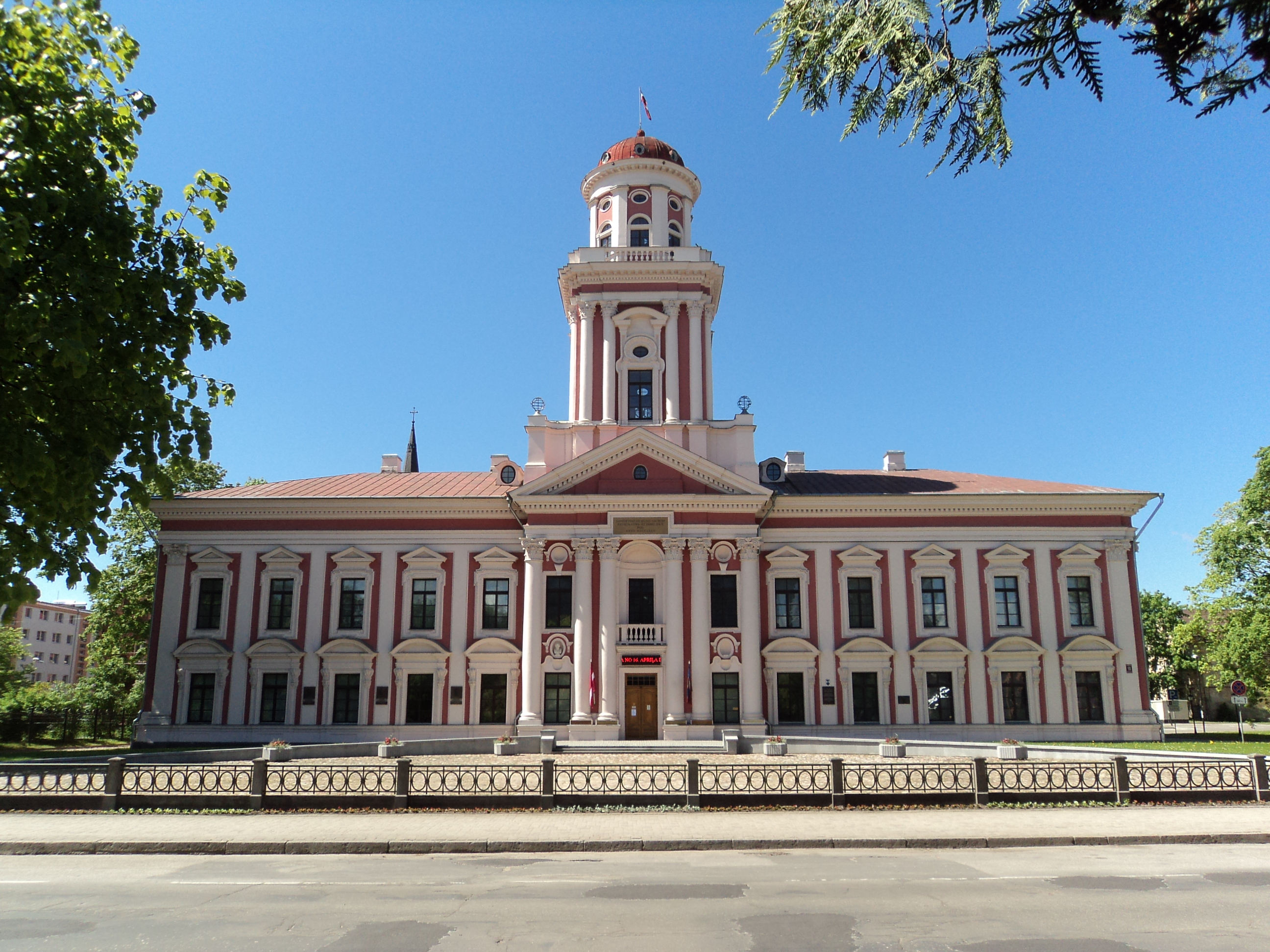 "Academia Petrina", Jelgava, Akadēmijas iela 10